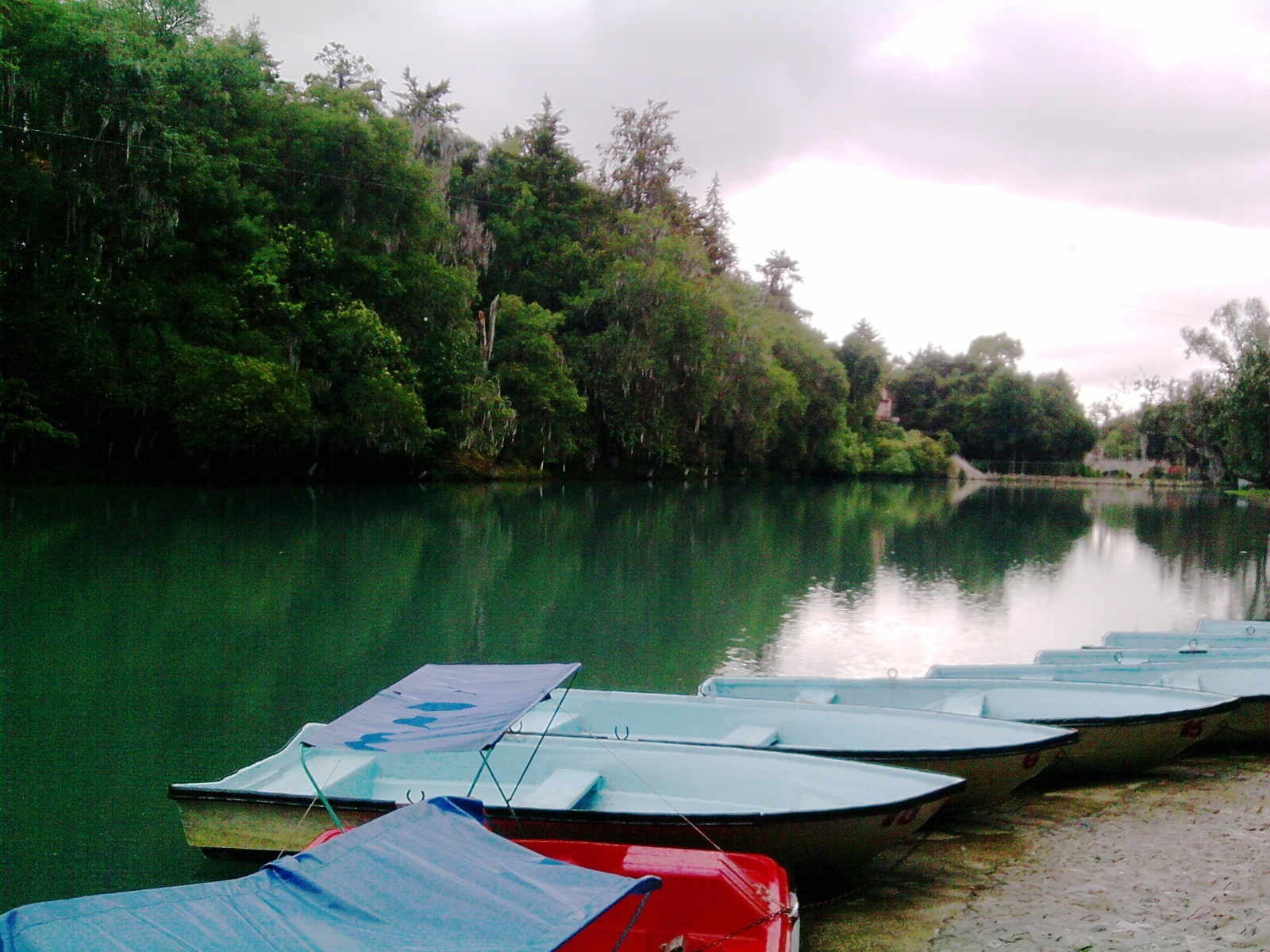 Parque Ecoturístico Bosque de las truchas en San Miguel Regla, Huasca de Ocampo, Hidalgo, México